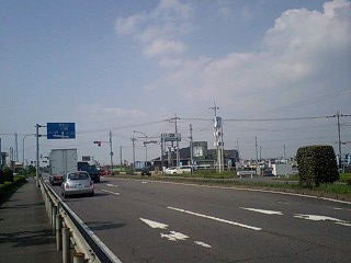 渋井交差点遠景（埼玉県川越市渋井）